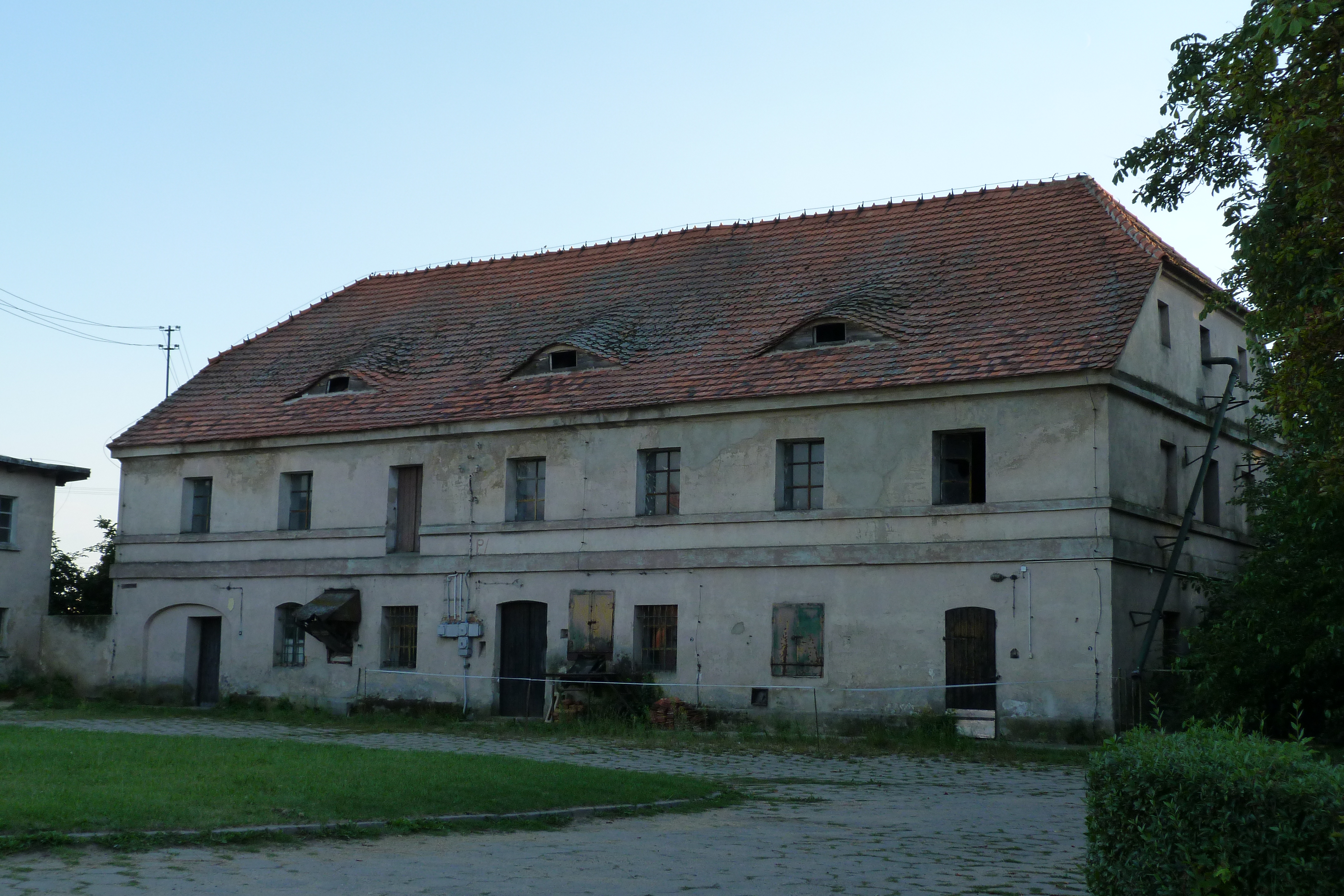 Spichlerz z II połowy XIX w. folwark Kłoda, gm. Rydzyna